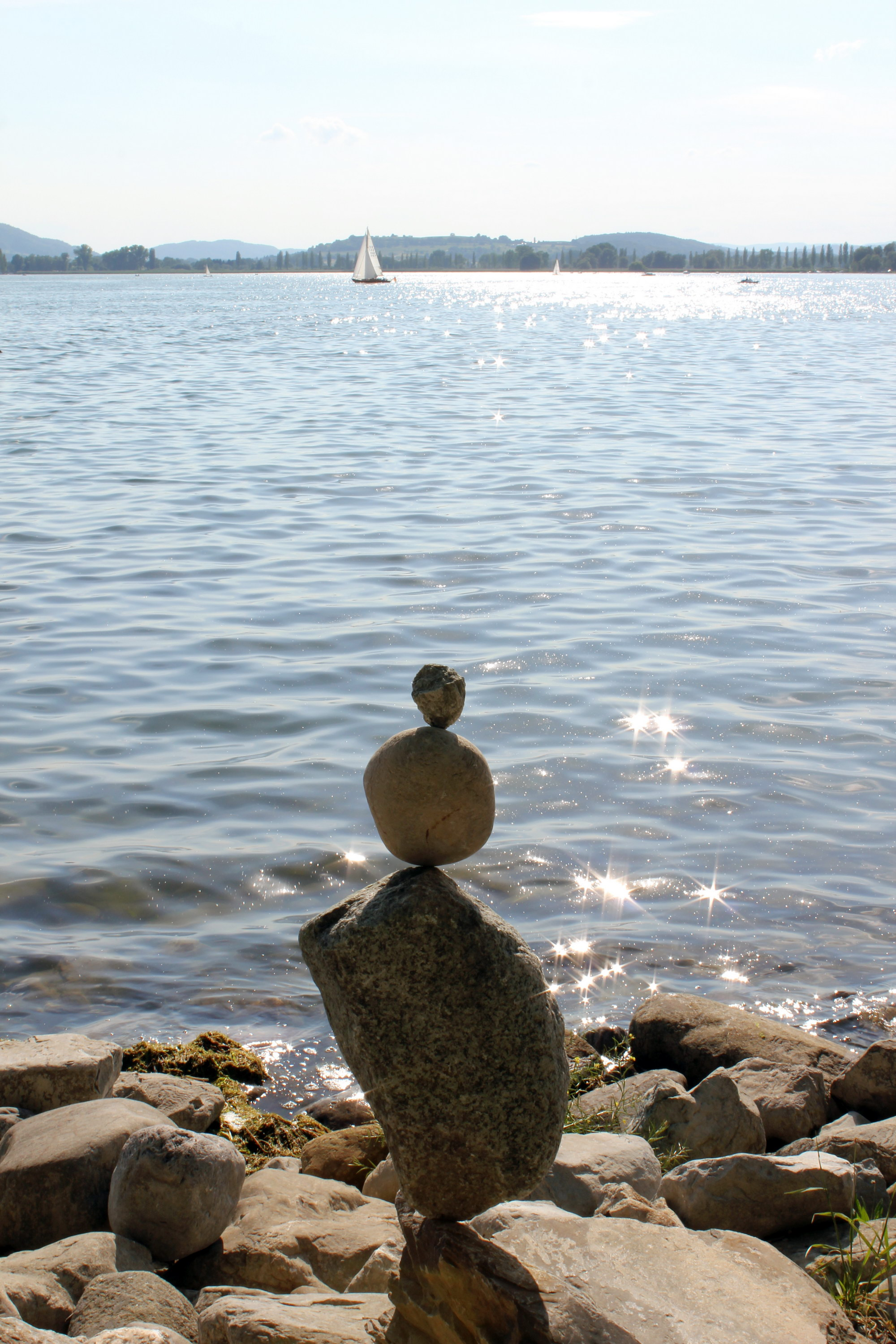 Steinkunst von Josef „Sepp“ Bögle, Radolfzell, Juni 2011